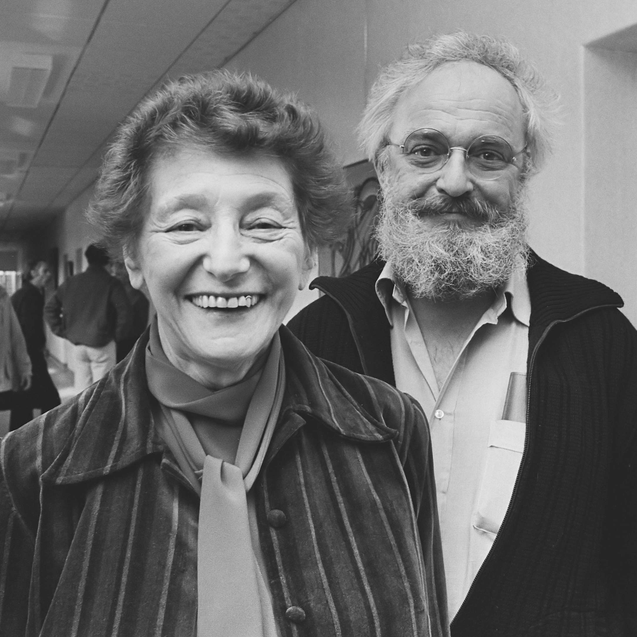 Nieuwe serie voor VARA-radio van Tony van Verre "Tony van Verre ontmoet Josepha Mendels" . Tony van Verre en de 79-jarige schrijfster Josepha Mendels 15 maart 1982